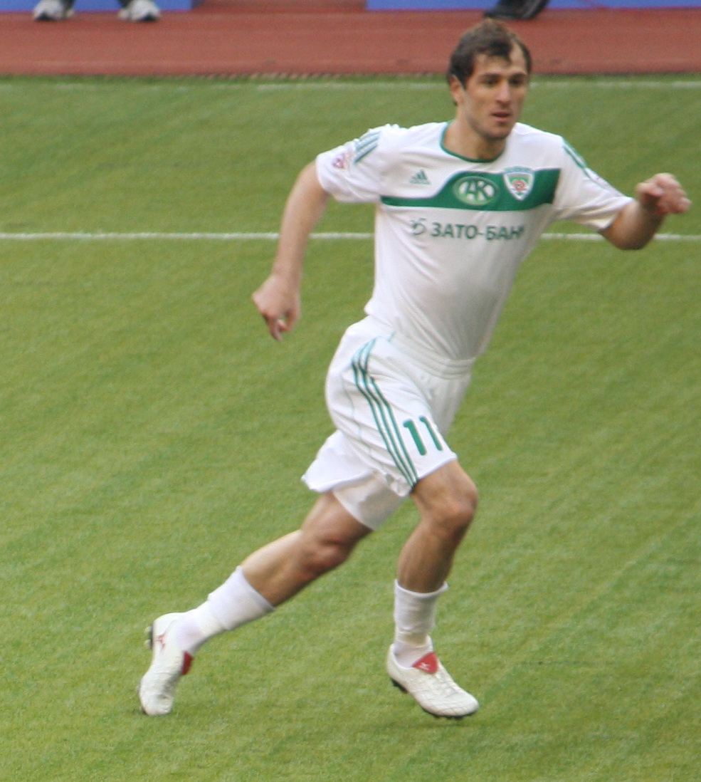 Shamil Asildarov